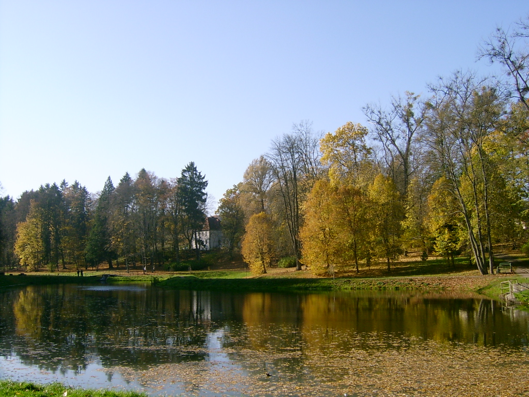 Staw w parku zdrojowym w Połczynie Zdroju